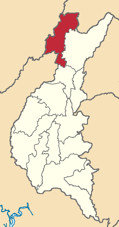 Mapa localizador del cantón en Los Ríos, Ecuador